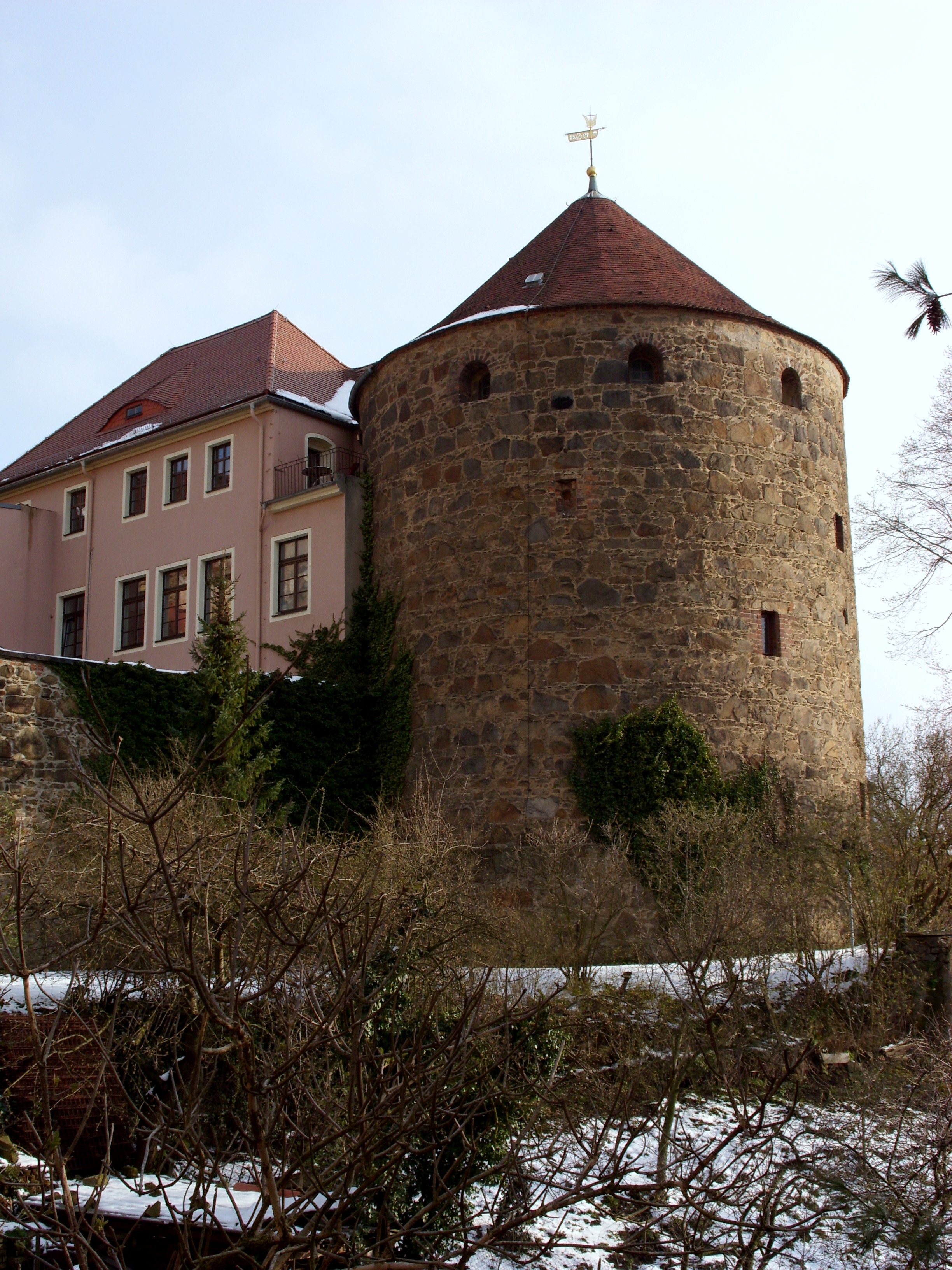 Die Röhrscheidtbastei (auch Fischerbastei) in Bautzen. Ansicht von Nordwesten.